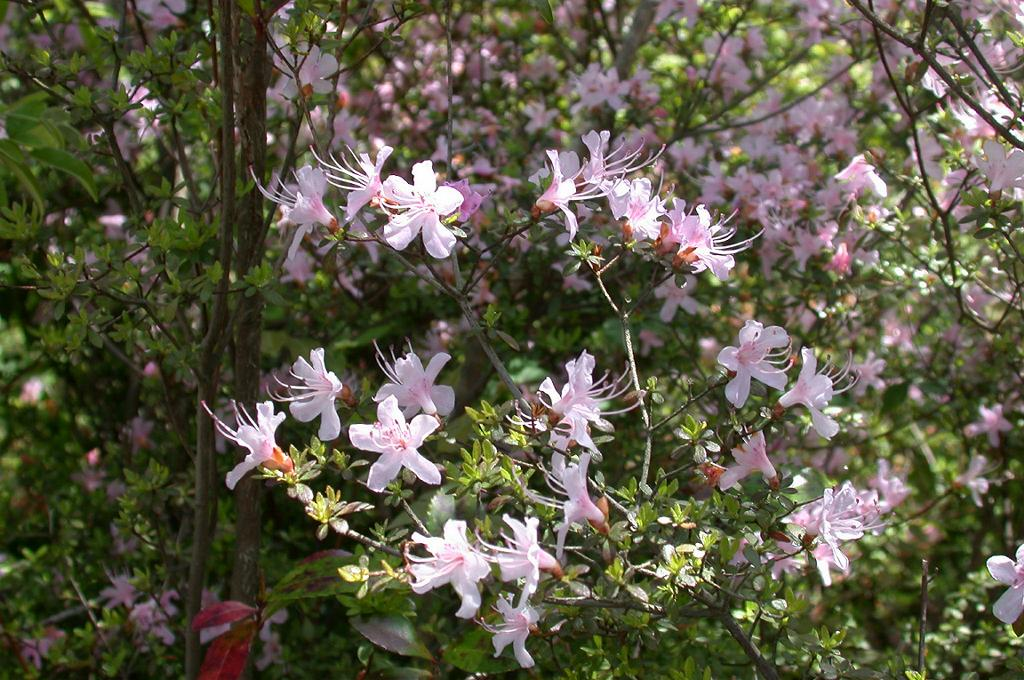 Rhododendron serpyllifolium：ウンゼンツツジ 2003/05/04 和歌山県田辺市：Tanabe City. Wakayama Pref. Japan